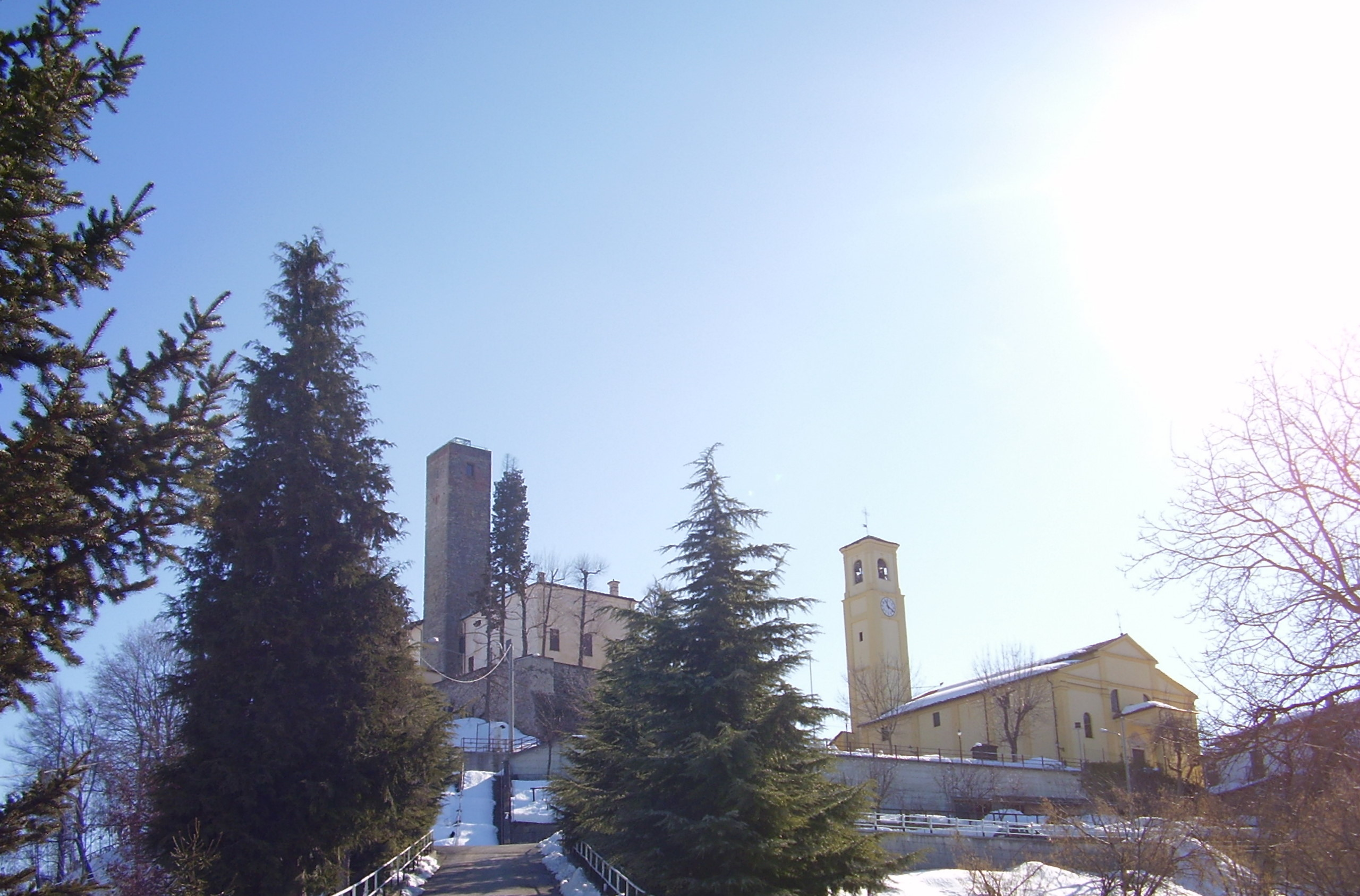 Mombasiglio (provincia di Cuneo): il castello e la chiesa